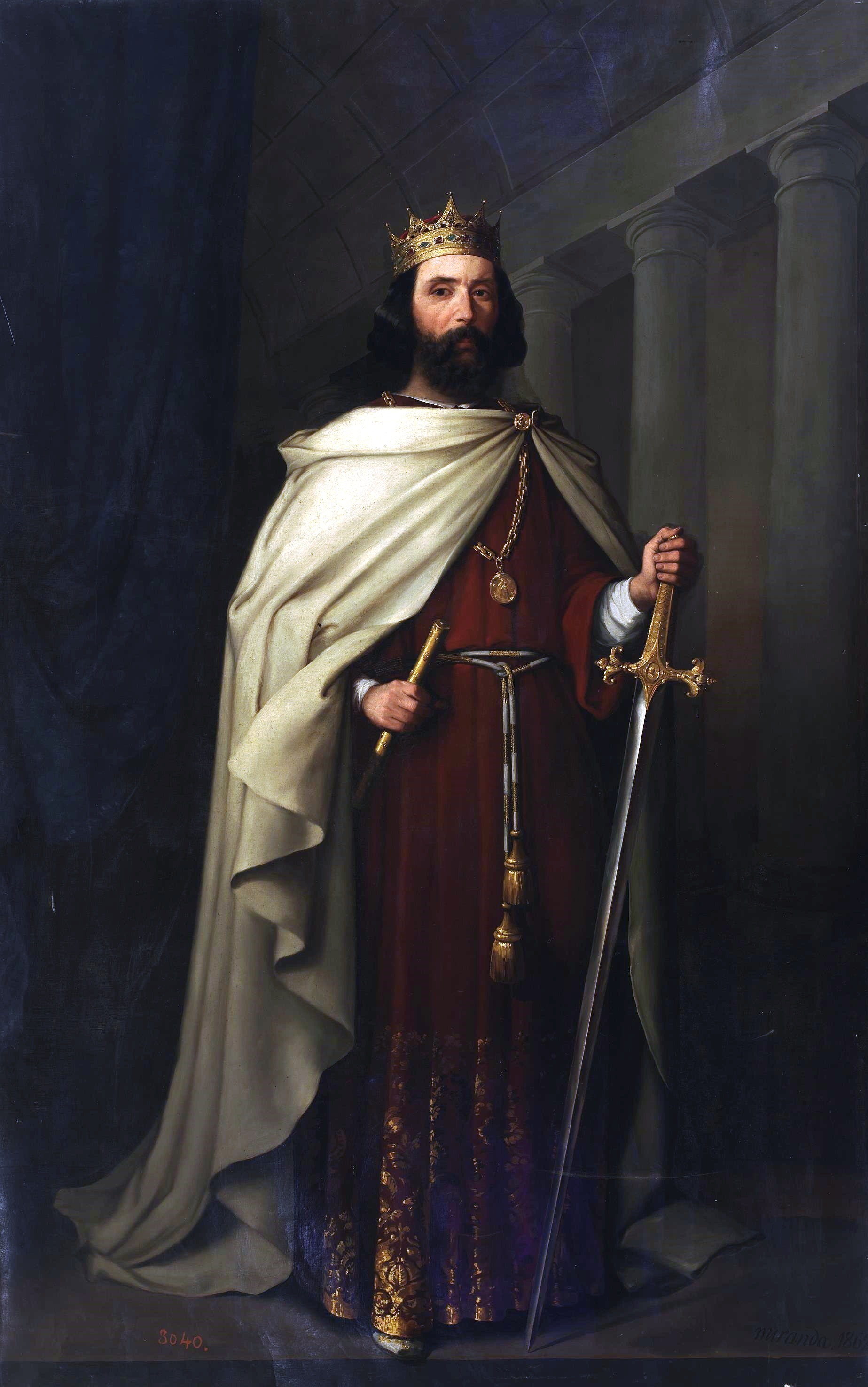 Retrato imaginario de Sancho Garcés IV de Sobrarbe († 832), rey legendario de Sobrarbe entre los años 815 y 832.